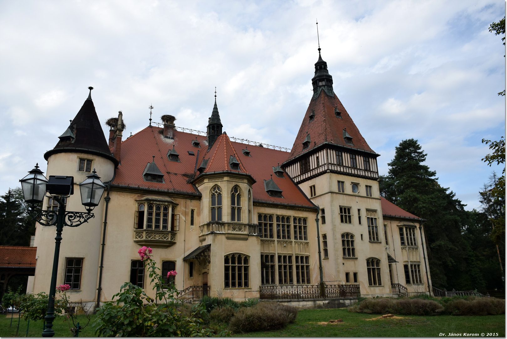 Dvorac Mailáth, Donji Miholjac